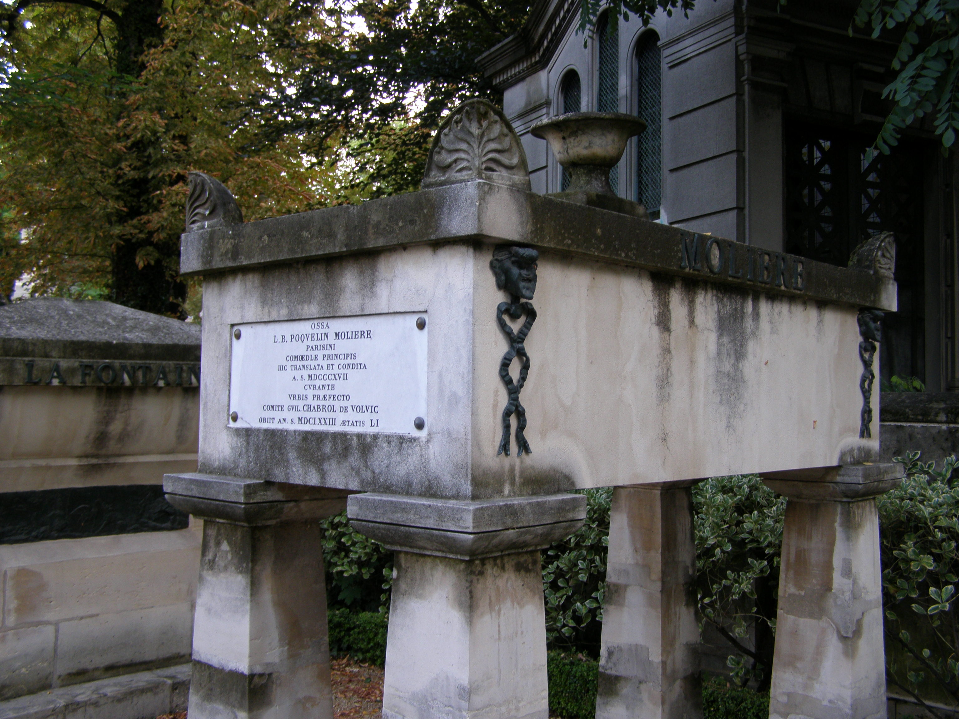 Grób Moliera, Cmentarz Père-Lachaise